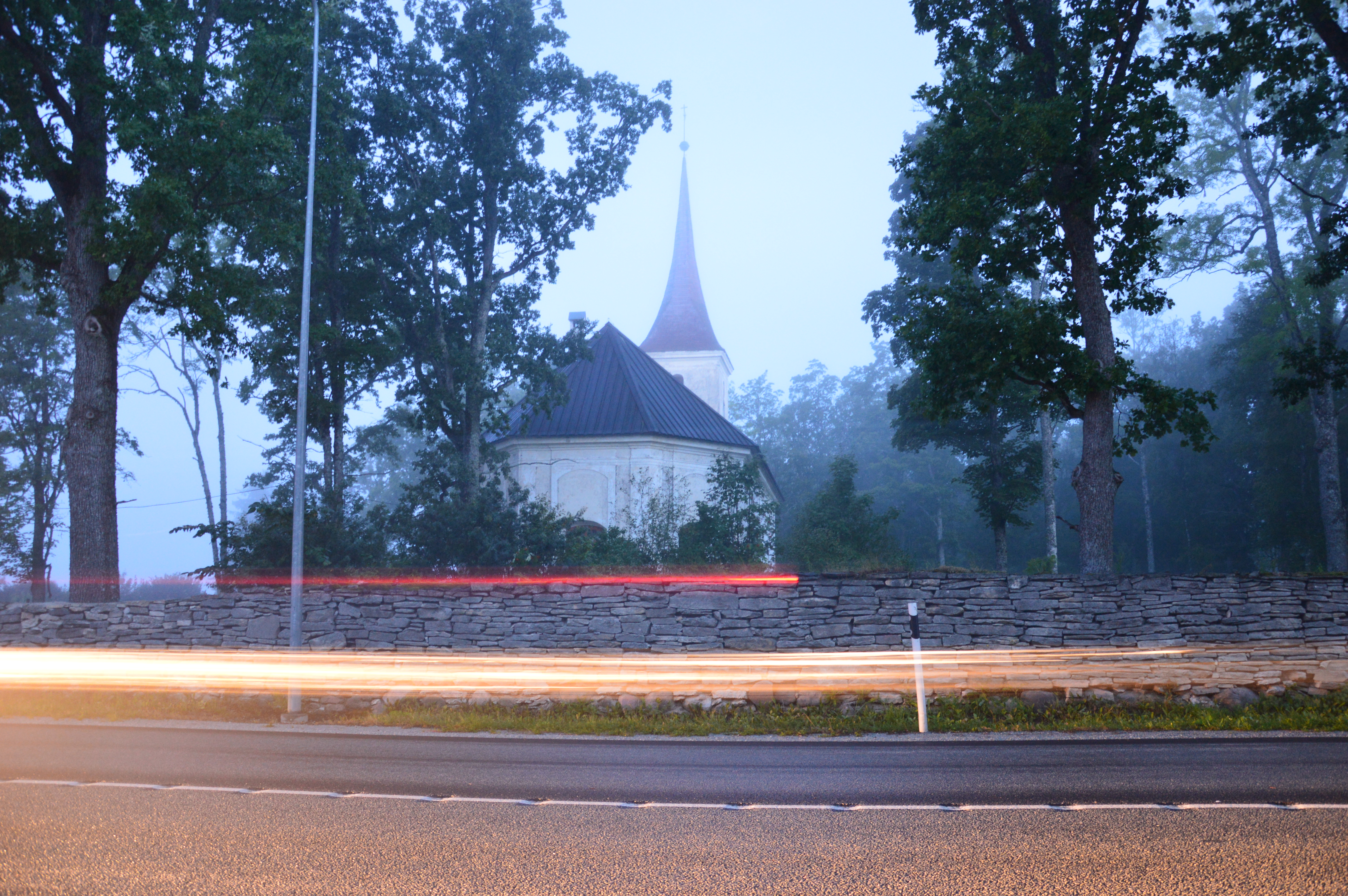 Anna kirik pildistatuna teiselt poolt Tallinn-Tartu maanteed.